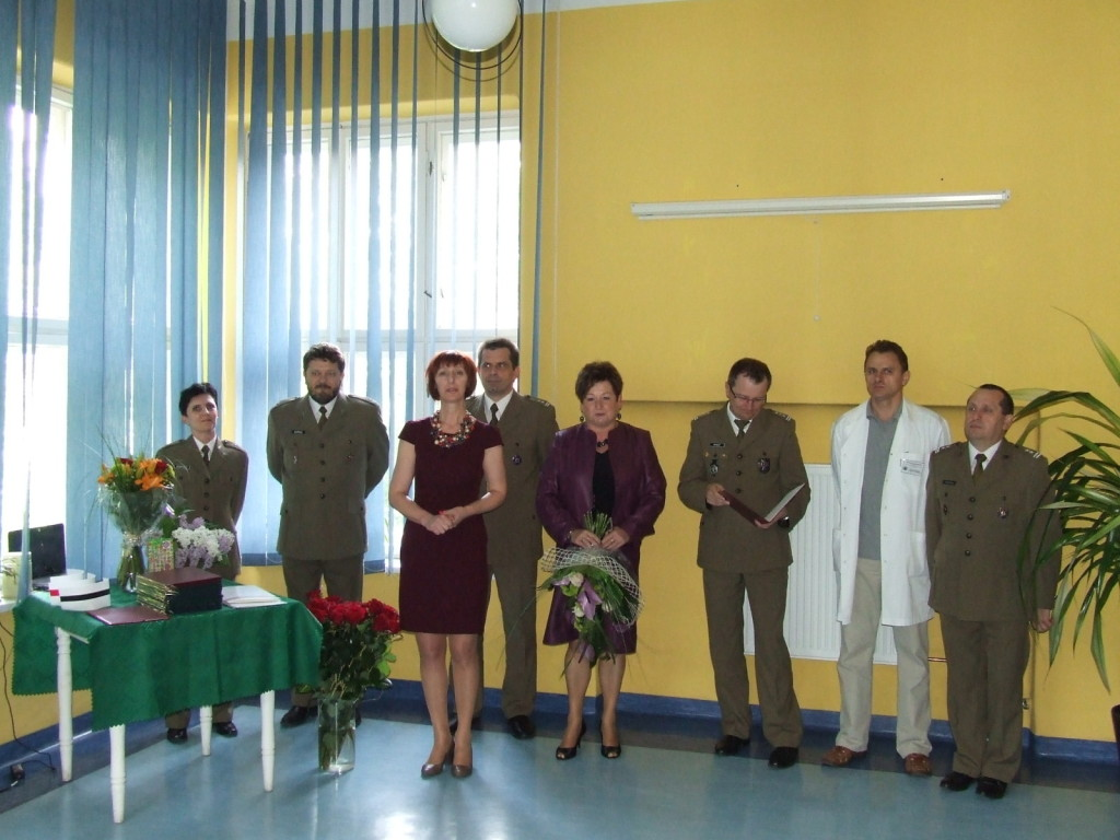 Szczecin, 2013r. Dzień Pielęgniarki i Położnej w 109 Szpitalu Wojskowym